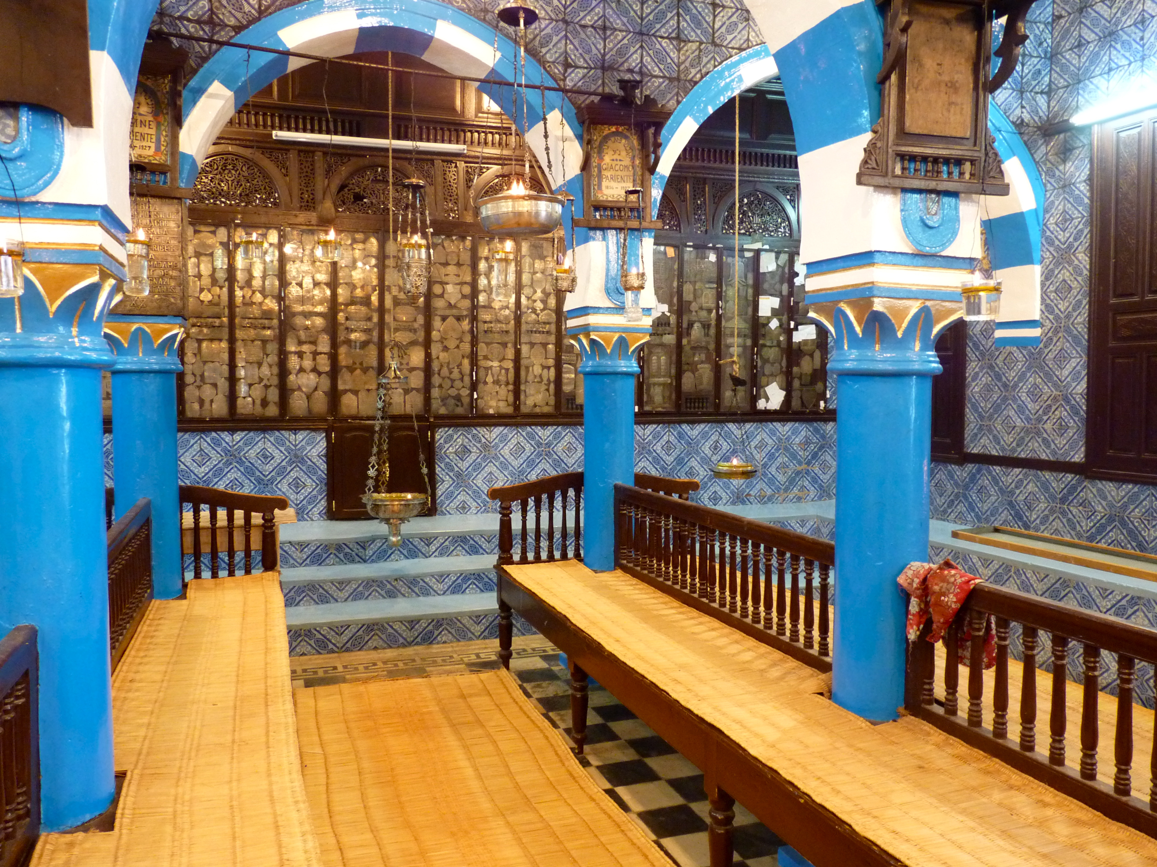 Synagogue at Djerba